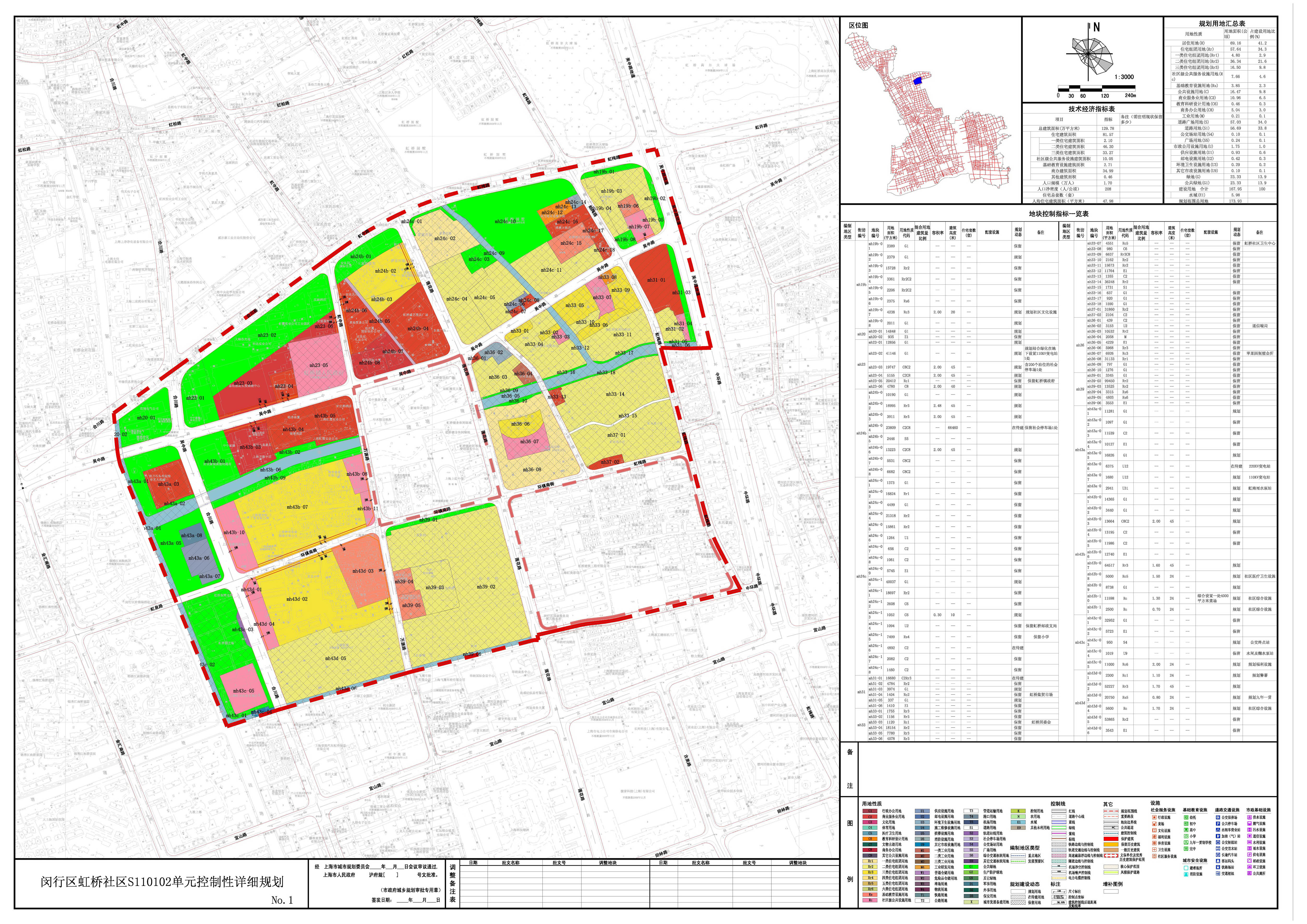 闵行区虹桥社区控制性详细规划MH35-09地块实施深化（上海市人民政府沪府规〔2013〕84号规划批文的附件，参见shgtj.gov.cn/ghsp/ghsp/mh/201401/t20140120 618834.html）